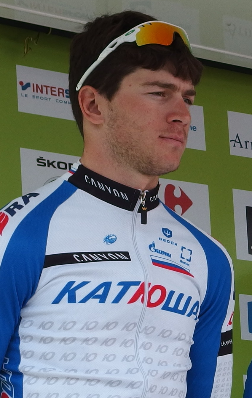 Tour de Bretagne 2014 - Présentation des équipes au départ de la sixième étape à Radenac - Équipe Itera-Katusha Depicted person: Mamyr Stash